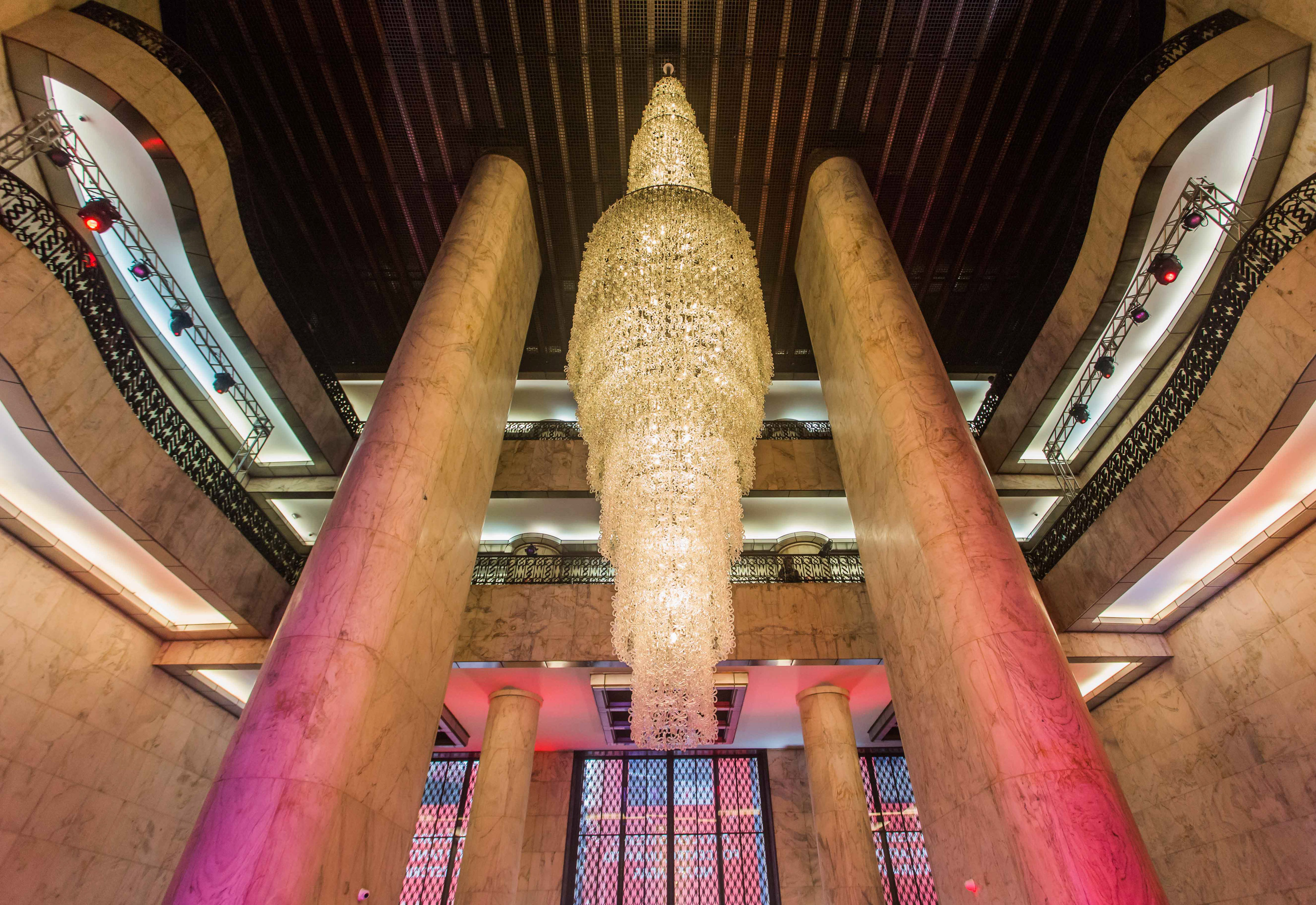 O governador Geraldo Alckmin participou da INAUGURAÇÃO DO EDIFÍCIO FAROL SANTANDER. Local: São Paulo/SP. Data: 25/01/2018. Foto: Alexandre Carvalho/A2img